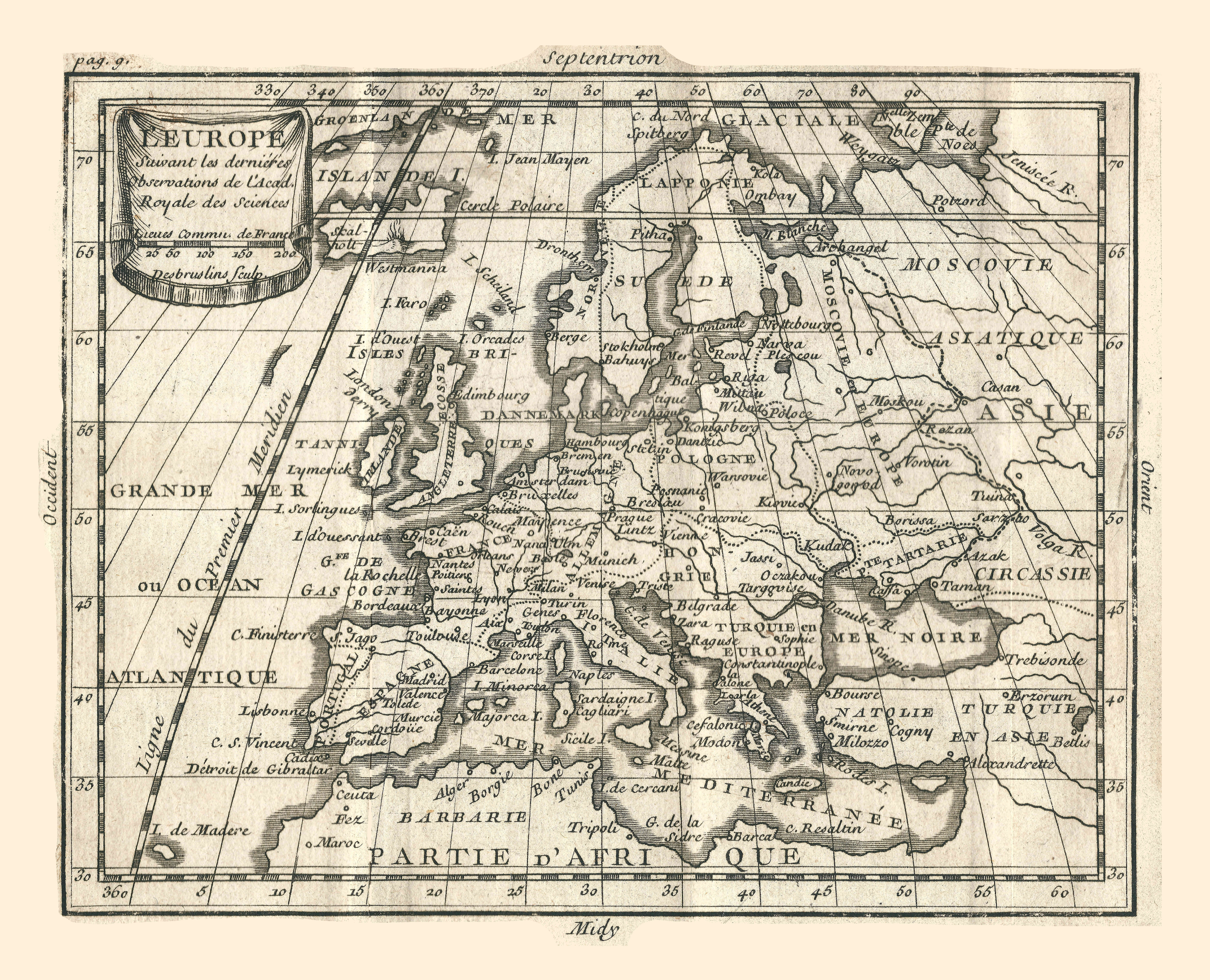 Géographie Buffier-Carte d'Europe